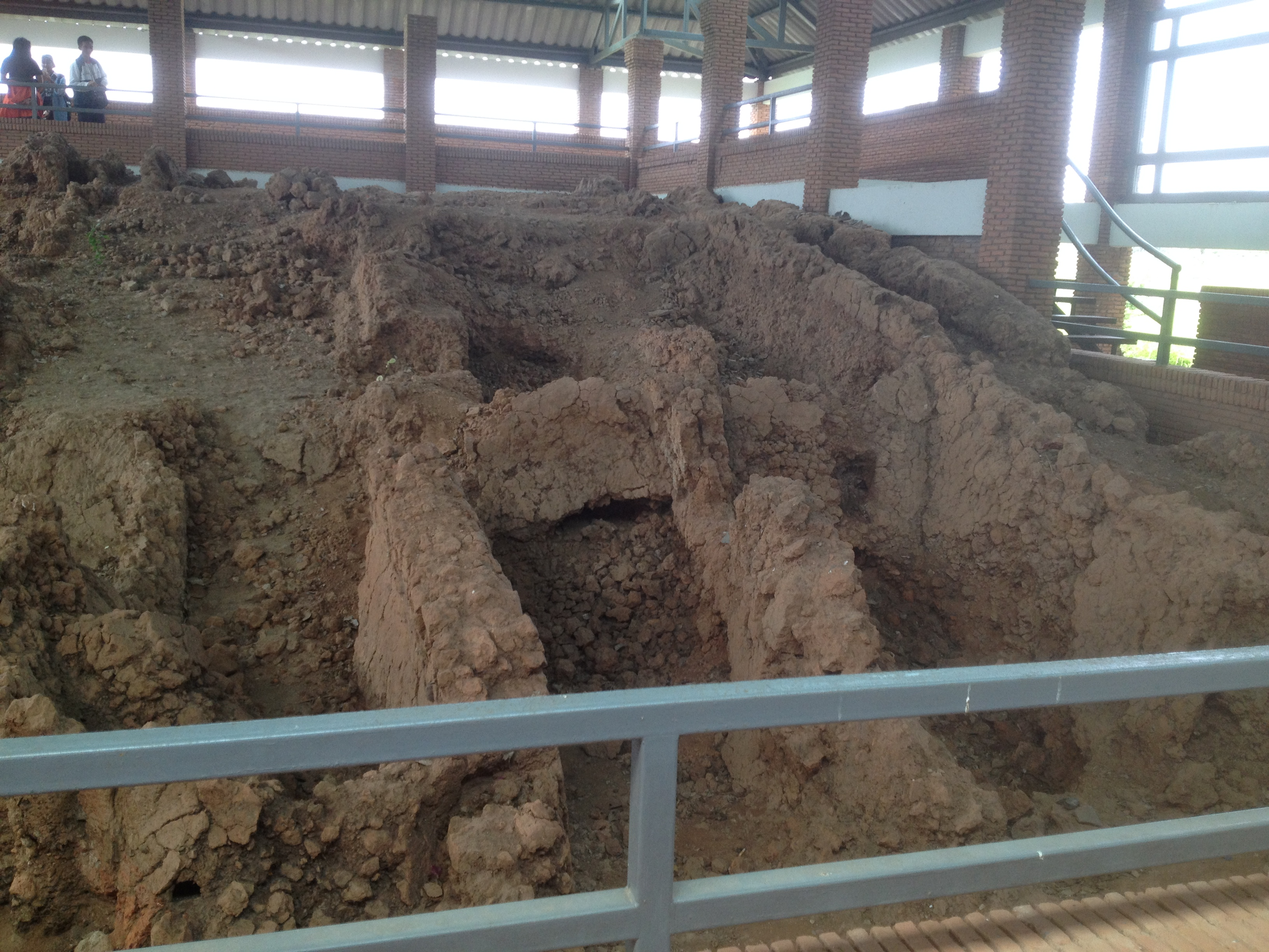 เตาสวาย เป็เตาเผาโบราณอายุประมาณ 1,000 ปี เป็นที่ผลิตเครื่องถ้วยศิลปะขอม ที่มีขนาดใหญ่ กรมศิลปากรได้เข้ามาบูรณะปฏิสังขรณ์ขึ้นและสร้างอาคารครอบเตาไว้ ภายในมีนิทรรศการเครื่องเคลือบโบราณ และมีเศษเครื่องถ้วยที่ขุดพบบางส่วน ตั้งอยู่ที่บ้านโคกเมือง เทศบาลตำบลโนนเจริญ อำเภอบ้านกรวด จังหวัดบุรีรัมย์